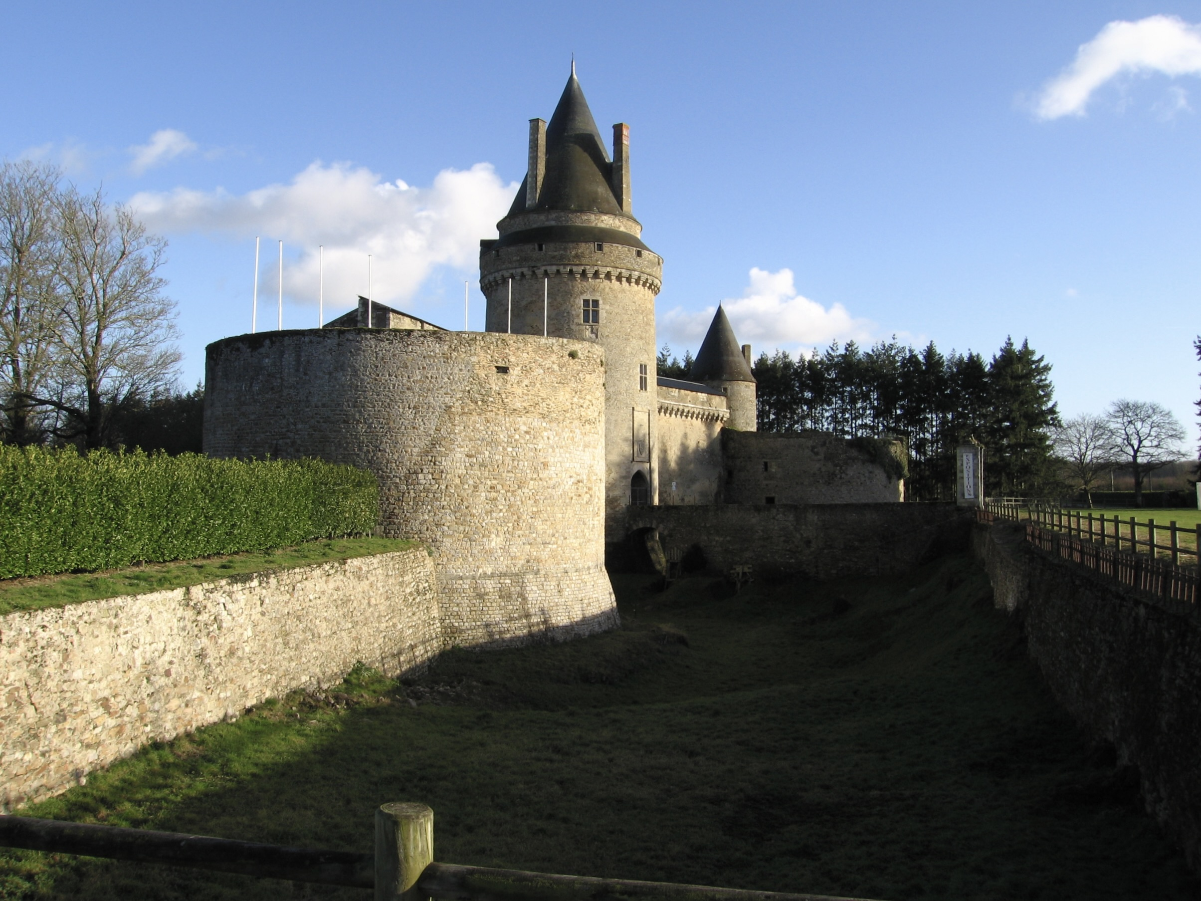 Tour du Sud-Ouest, Tour du Pont-Levis et Tour des prisons formant la porte d'accès au Château de Blain .